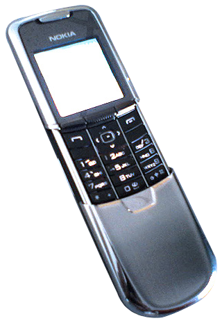 Nokia 8800